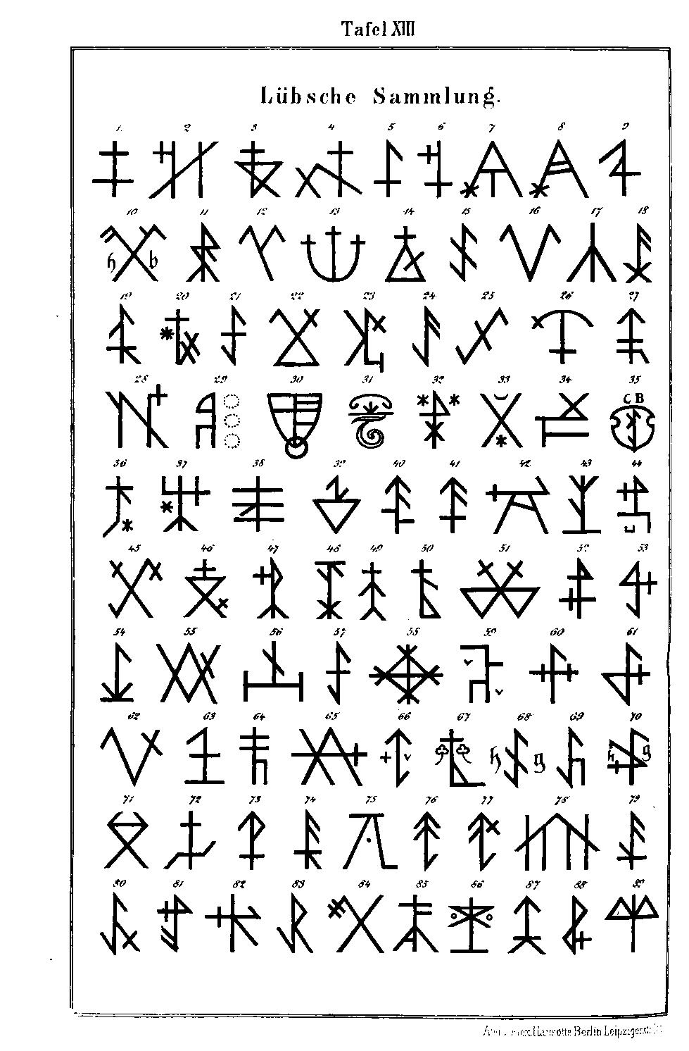 "Die Haus- und Hofmarken, Tafel XIII